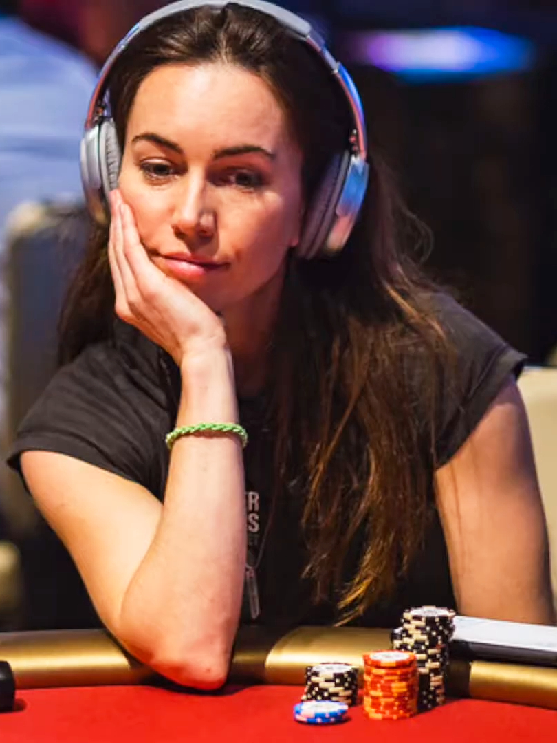 Liv Boeree bei der WPT Aria Summer Championship